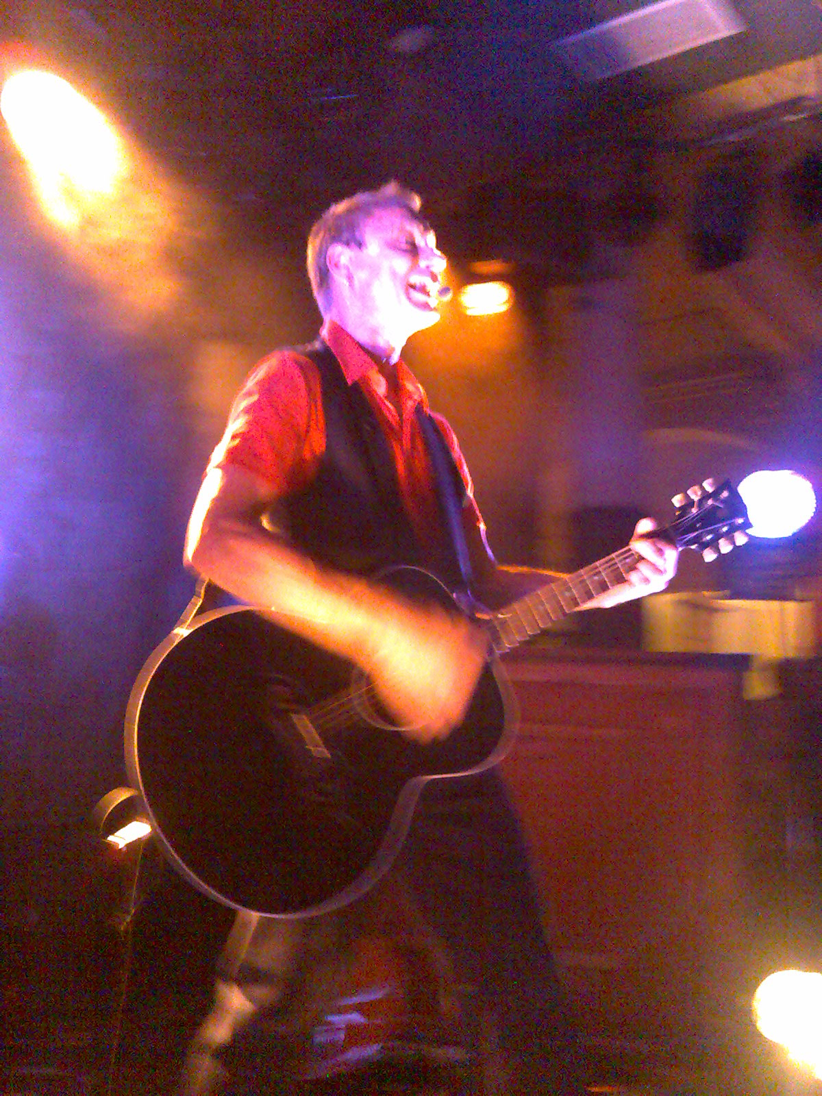 Ismo Alanko at Tammerfest, 2007-07-14